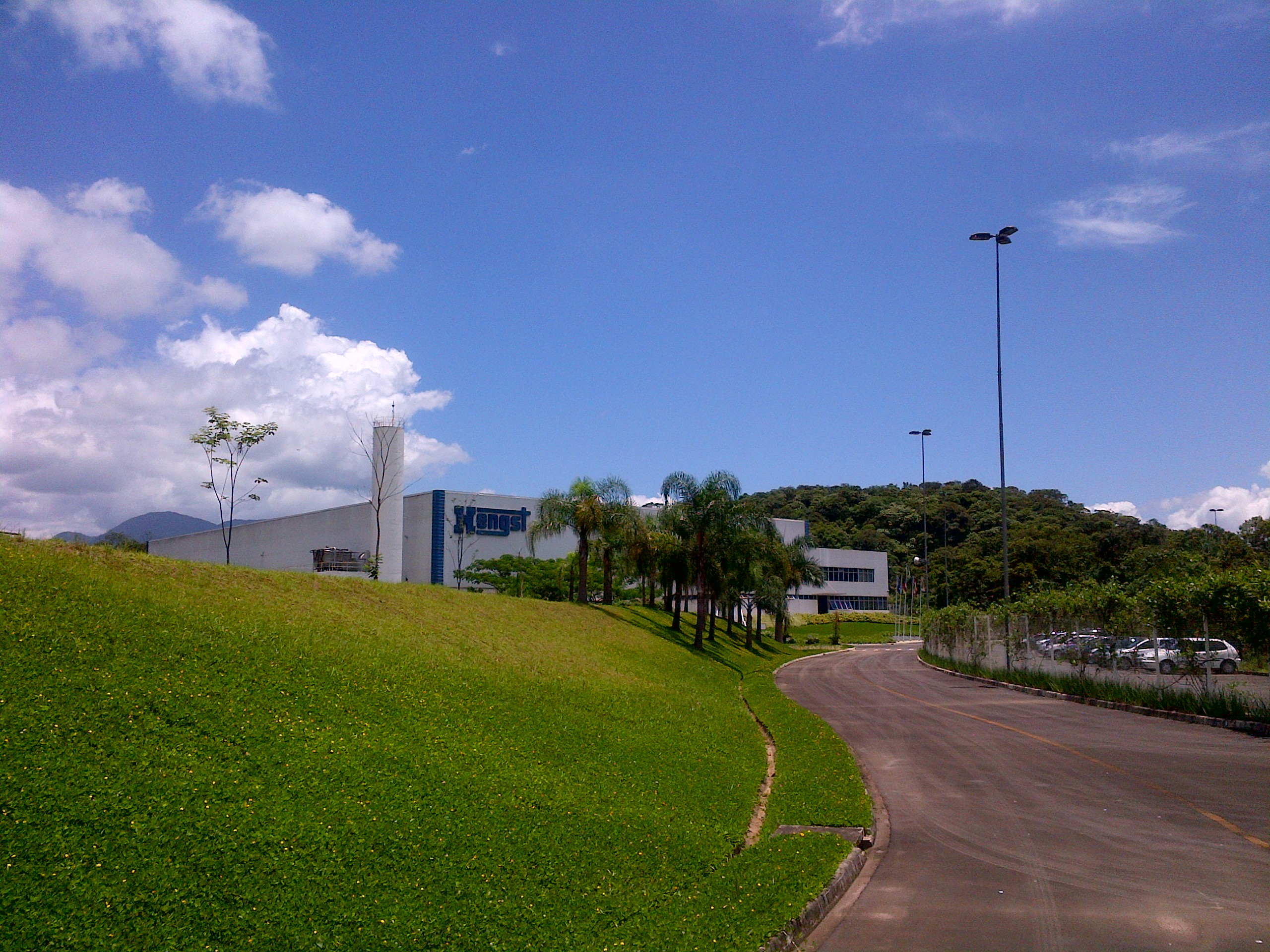 Standort Joinville